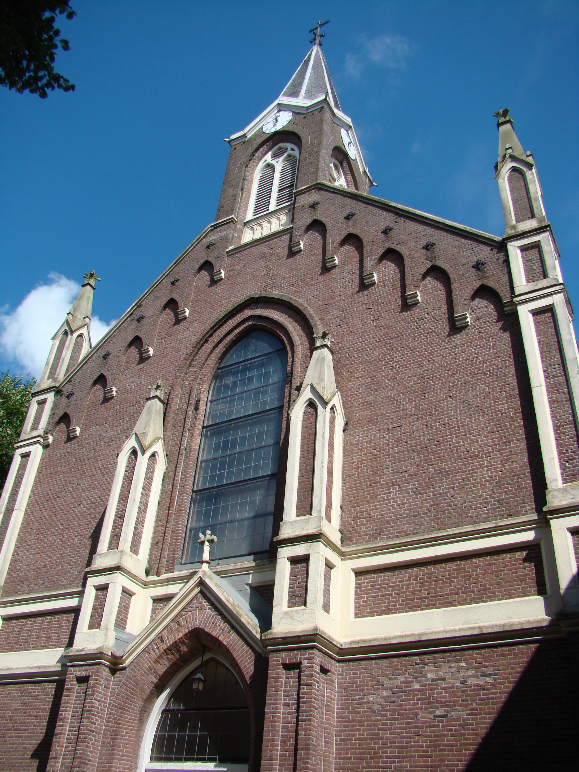 Rijksmonumenten in De Rijp, Monumental buildings in De Rijp, Netherlands